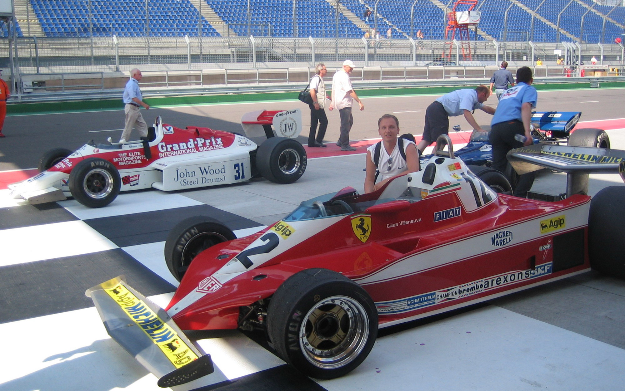 historische Formel 1 am Eurospeedway La voiture au second plan doit être une F2 Jordan